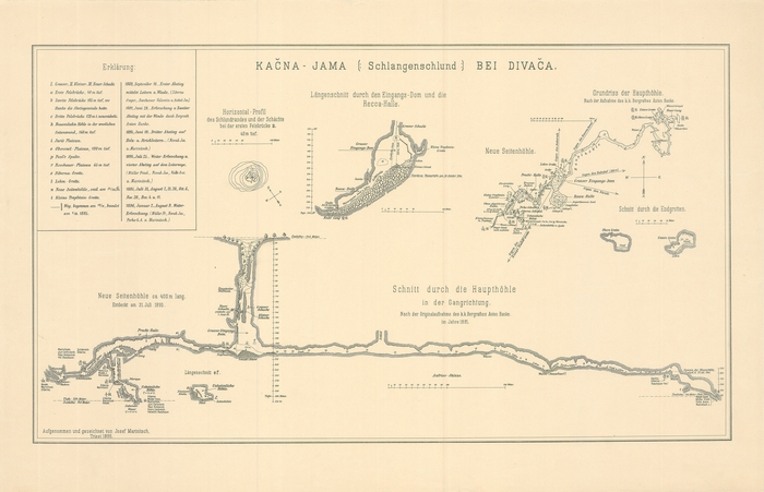 Načrt Kačne jame.